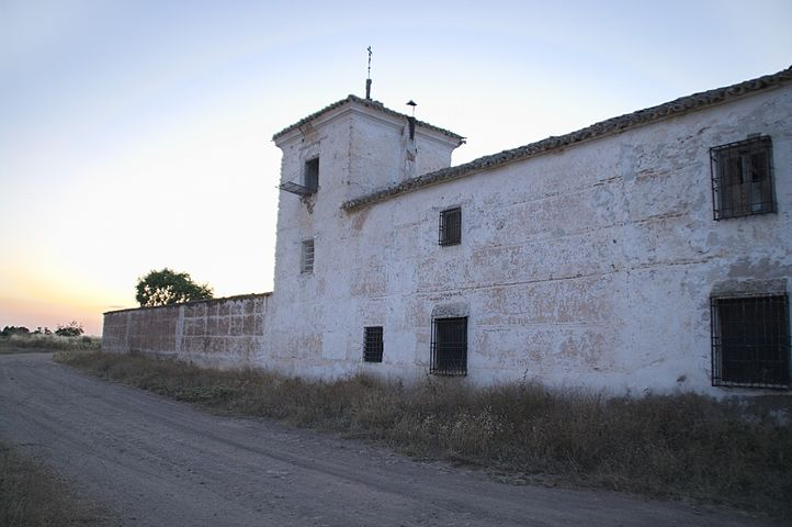 Estado de la fachada lateral de la Venta de Borondo en 2011.